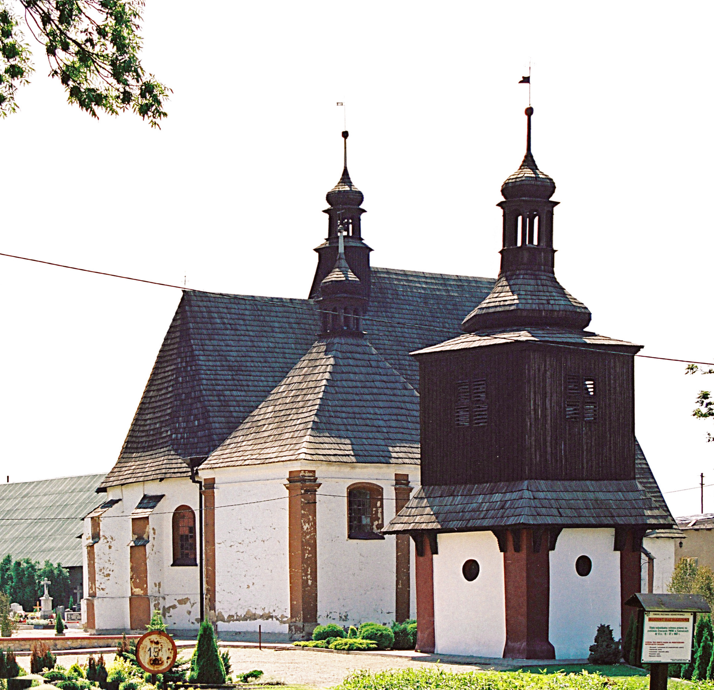 Kościół w Sadowiu, gmina Koszecin, powiat lubliniecki, województwo śląskie